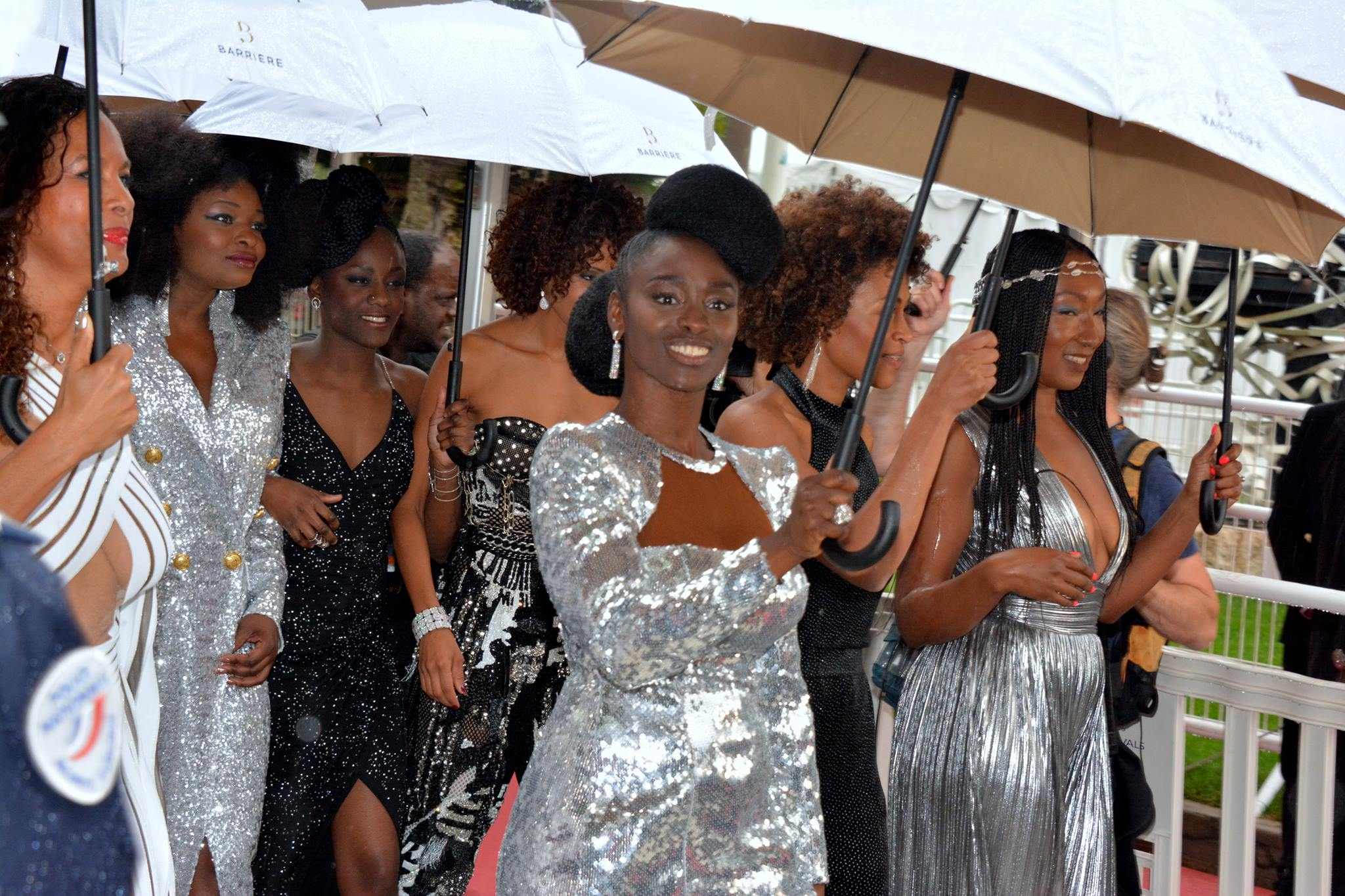 festival de Cannes AnnotationsThis image is annotated: View the annotations at Commons